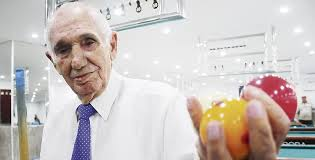 Perfil